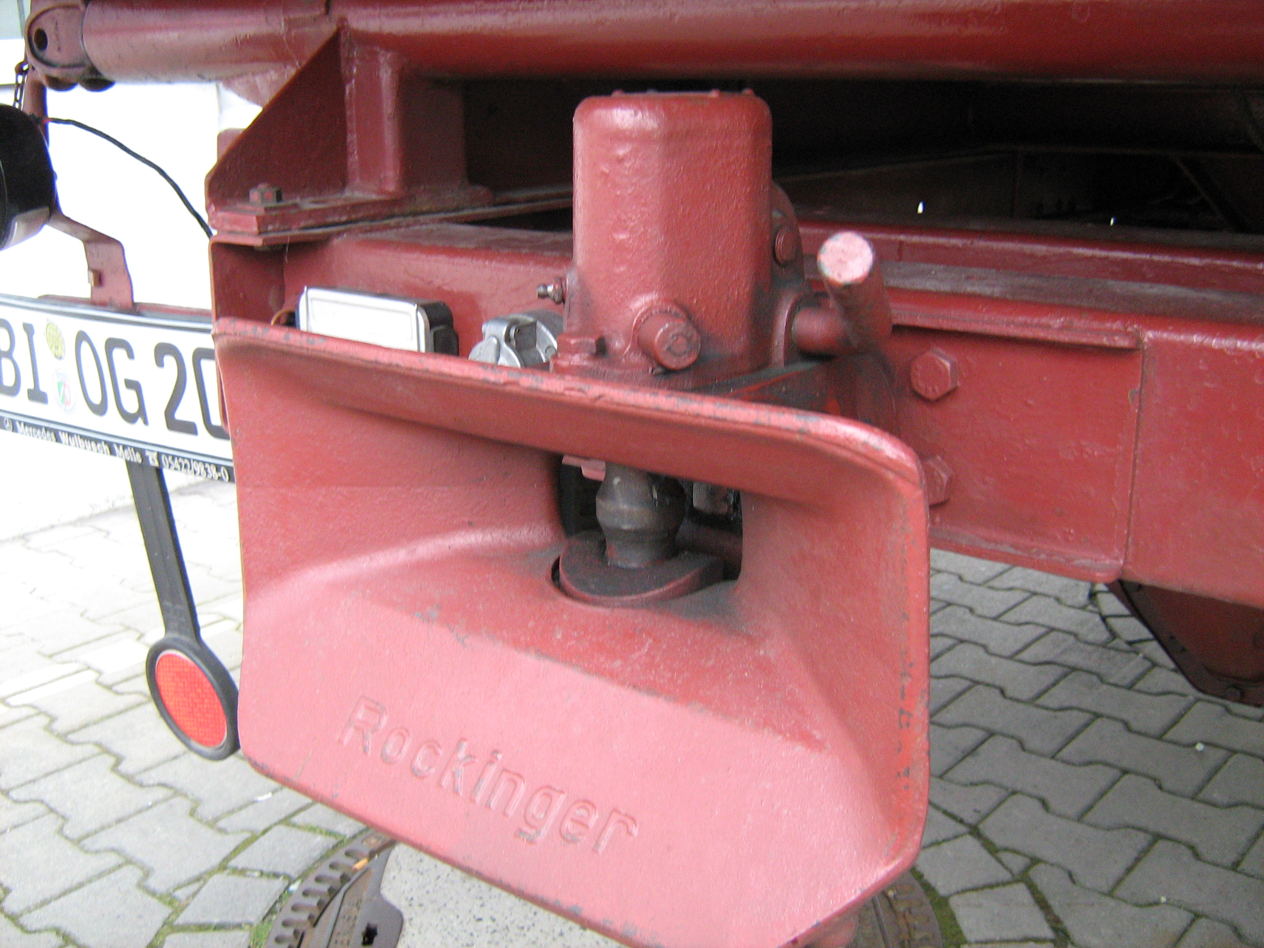 Rockinger Anhängerkupplung in den 60er + 70er Jahren